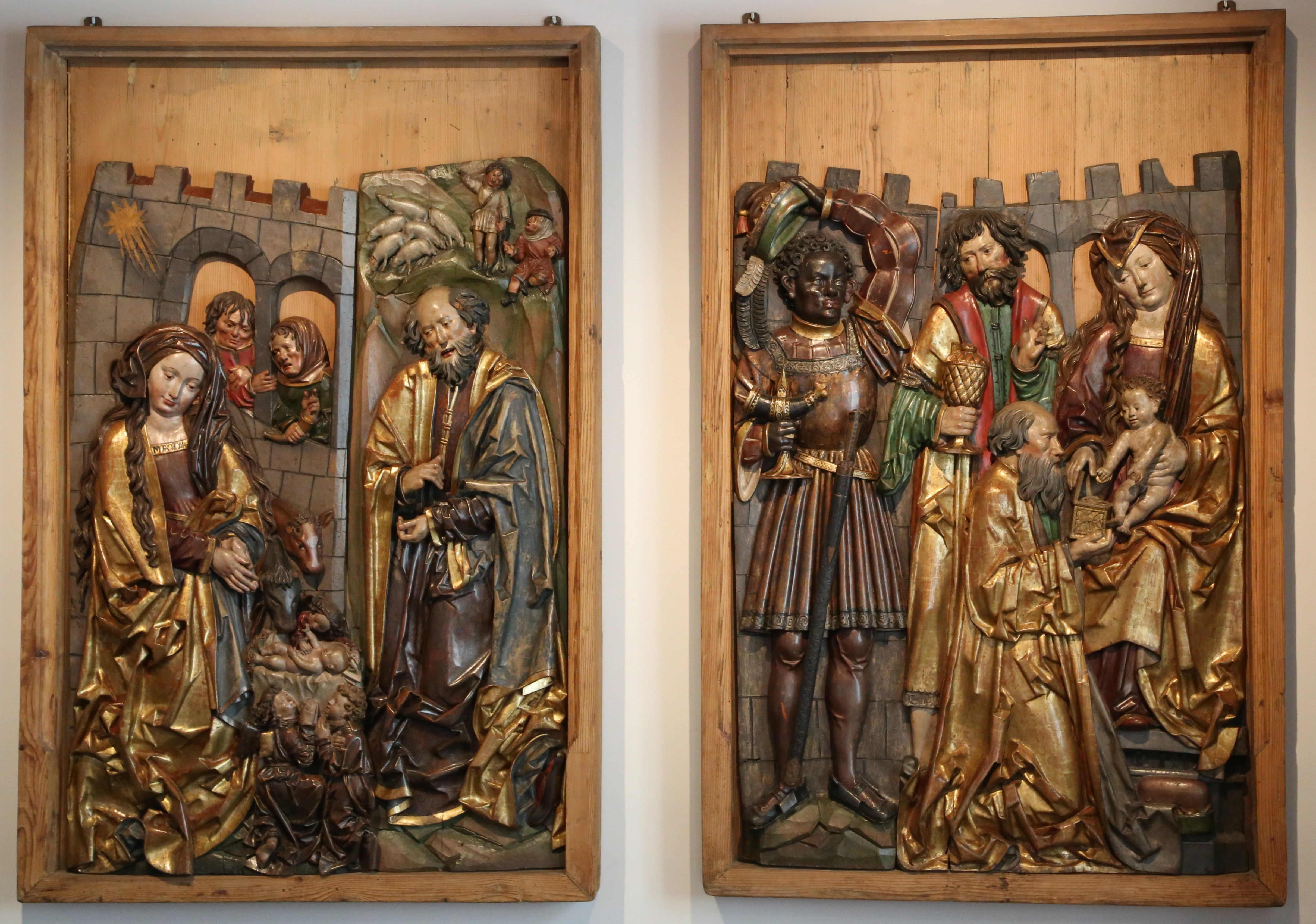 Niklaus Weckmann: Geburt Christi und Anbetung der Könige, Flügelreliefs vom ehem. Hochaltar der Pfarrkirche Attenhofen, Ulm um 1515, Lindenholz, Reste der originalen und einer neueren Fassung; Ulmer Museum Niklaus Weckmann (1481–1526) Alternative names Weckmann, NikolausDescriptionGerman sculptorDate of birth/death 1481 1526 Location of birth/death UlmWork period1481–1526Work location Ulm Authority control : Q1990482 VIAF: 5733801 ISNI: 0000 0000 8085 5295 LCCN: nr94023526 GND: 119107392 RKD: 114578 WorldCat creator QS:P170,Q1990482